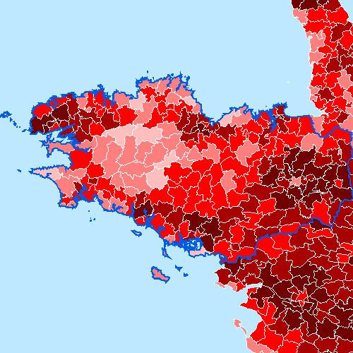 Carte de la proportion des moins de 20 ans dans la population de la région Bretagne, par cantons, en 1999. Légende : Image:-20ans1999-canton legende.jpg Cette carte est généreusement fournie par l'IAAT (Institut atlantique d'aménagement du territoire) Je la place comme convenu avec eux sous licence GFDL Utilisateur:Archeos Catégorie:Carte démographique Catégorie:Région Bretagne Catégorie:Image GFDL - Société